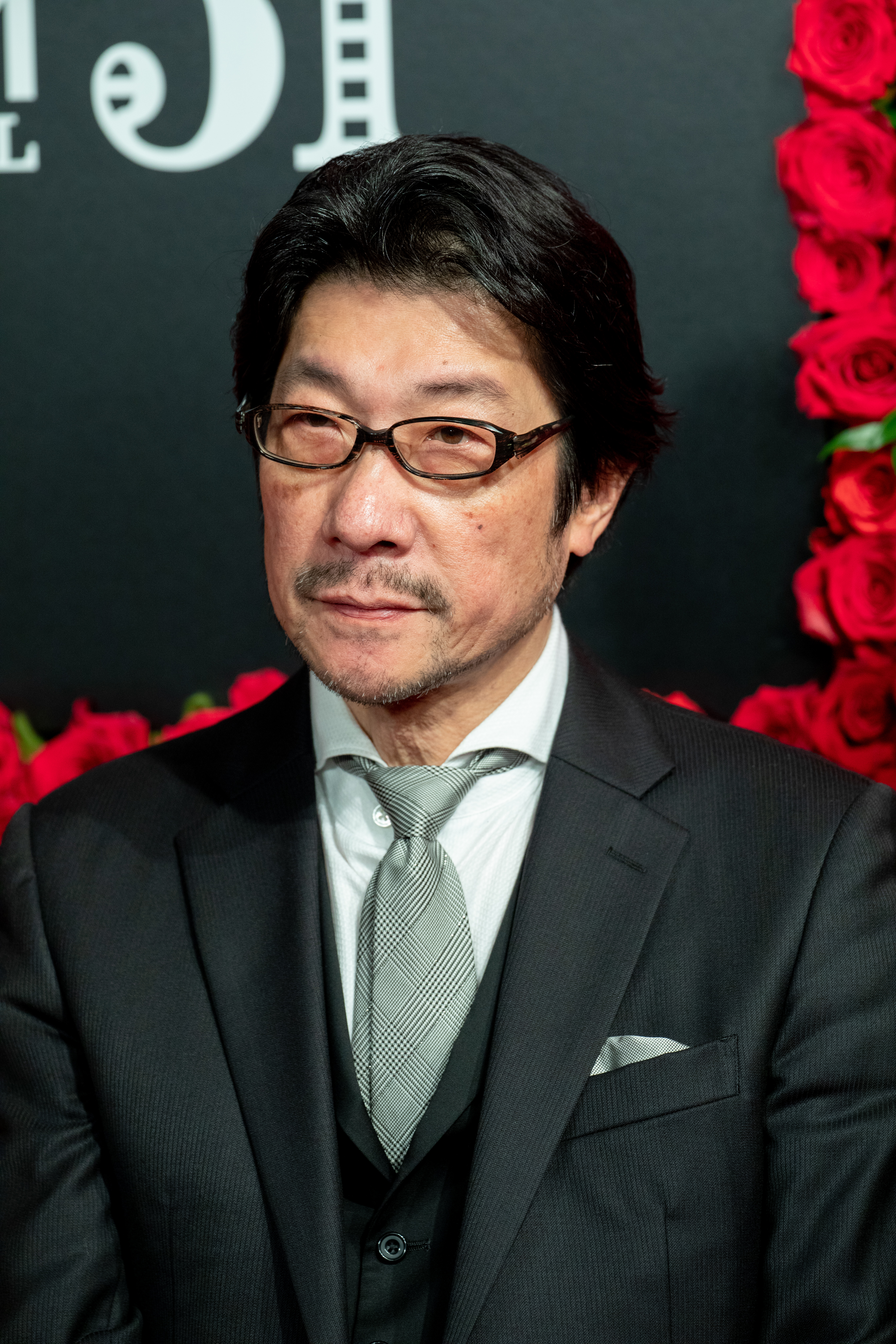 第30回 東京国際映画祭 オープニングセレモニー 阪本順治 (半世界)